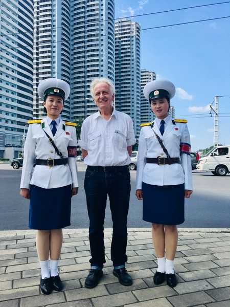 Uwe Kräuter zusammen mit zwei Verkehrspolizistinnen in Pjöngjang, Hauptstadt von Nordkorea. Pjöngjang ist wohl die einzige Stadt in der Welt, wo nicht Männer sondern Frauen den Verkehr regeln. Sie werden oft "Strassenengel" genannt.